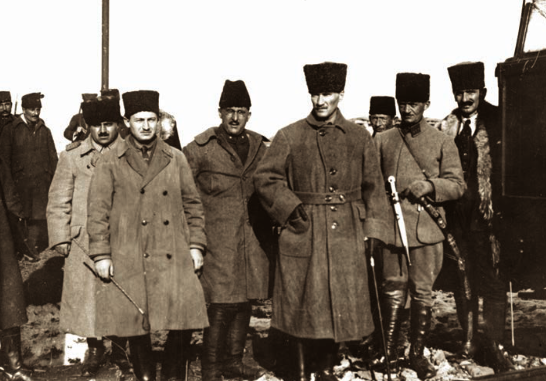 TBMM Başkanı Mustafa Kemal Paşa Batı Cephesi’nde denetlemelerde bulunurken, Eskişehir, 4 Aralık 1920